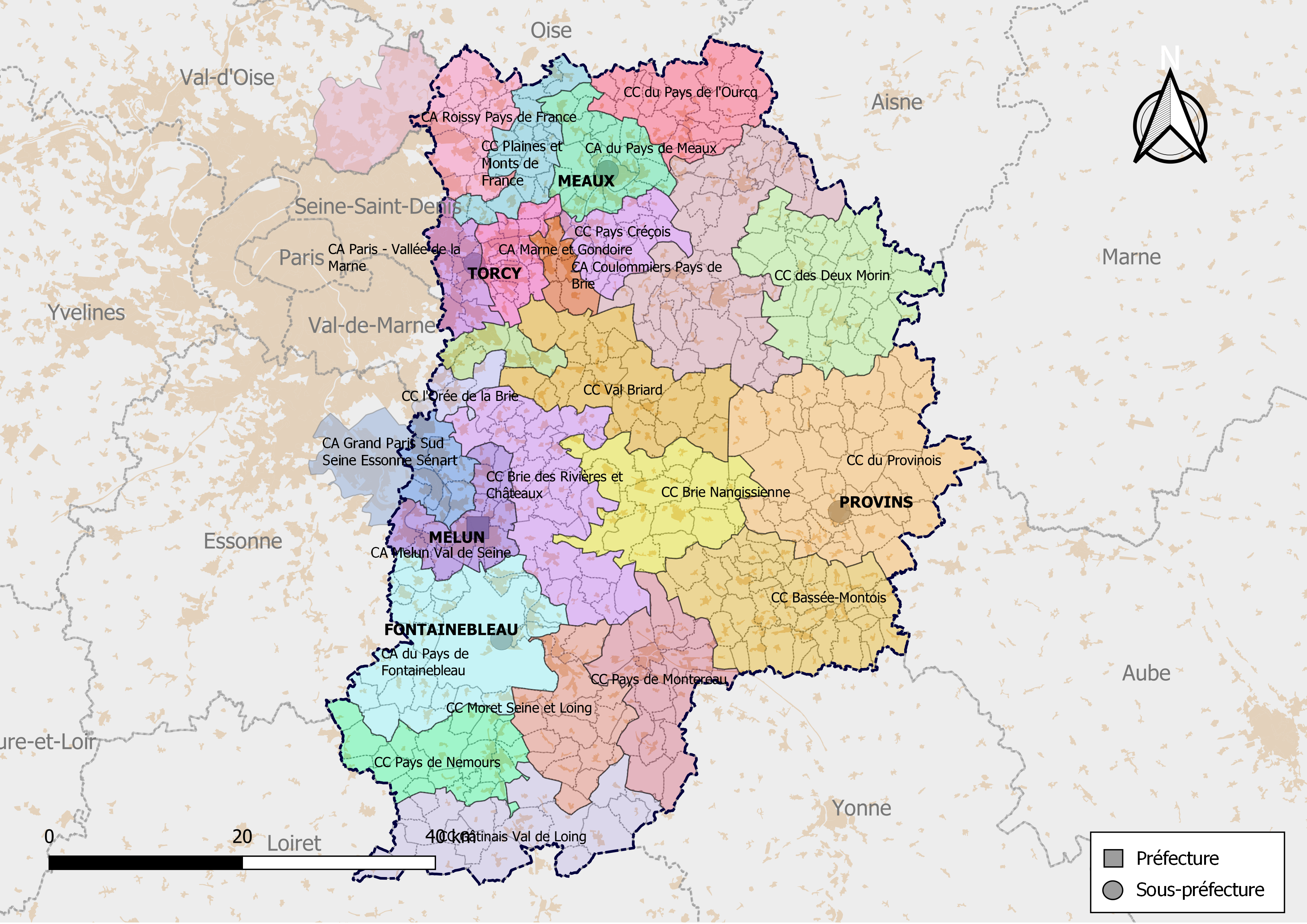 Carte des intercommunalités du département de Seine-et-Marne, France. Composition au 1er janvier 2019.